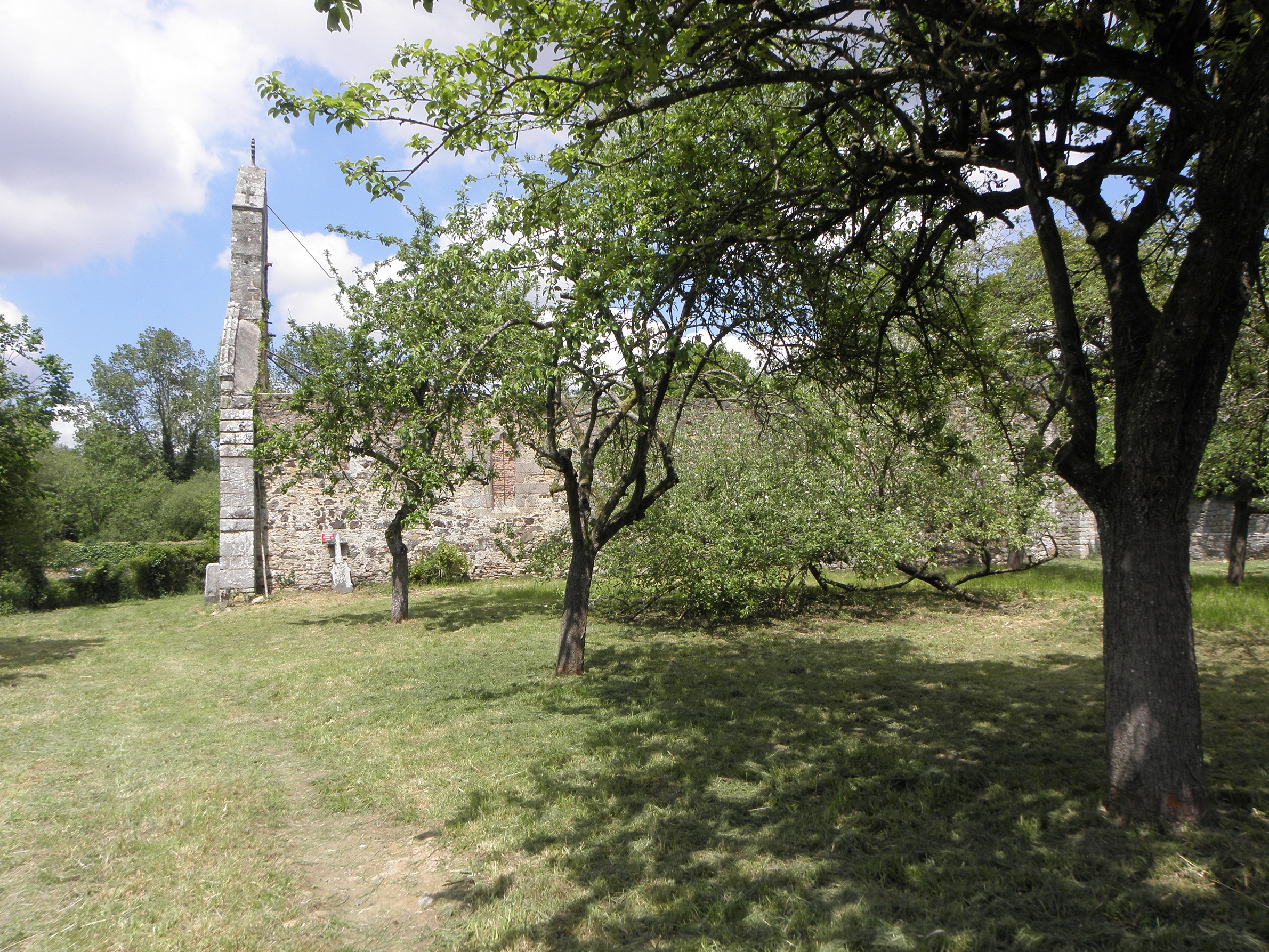 Ancienne église Saint-Judoce, commune de Saint-Judoce (22). Vue méridionale.